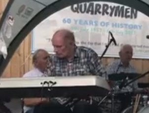 John Duff Lowe, en el piano con The Quarrymen actuando en St. Peters Church, Woolton, Liverpool, el 06-JUL-2017, en el mismo lugar (el jardín posterior de la iglesia) en el que la banda tocó liderada por John Lennon el 06-JUL-1957, cuando John Lennon se encontró con Paul McCartney.